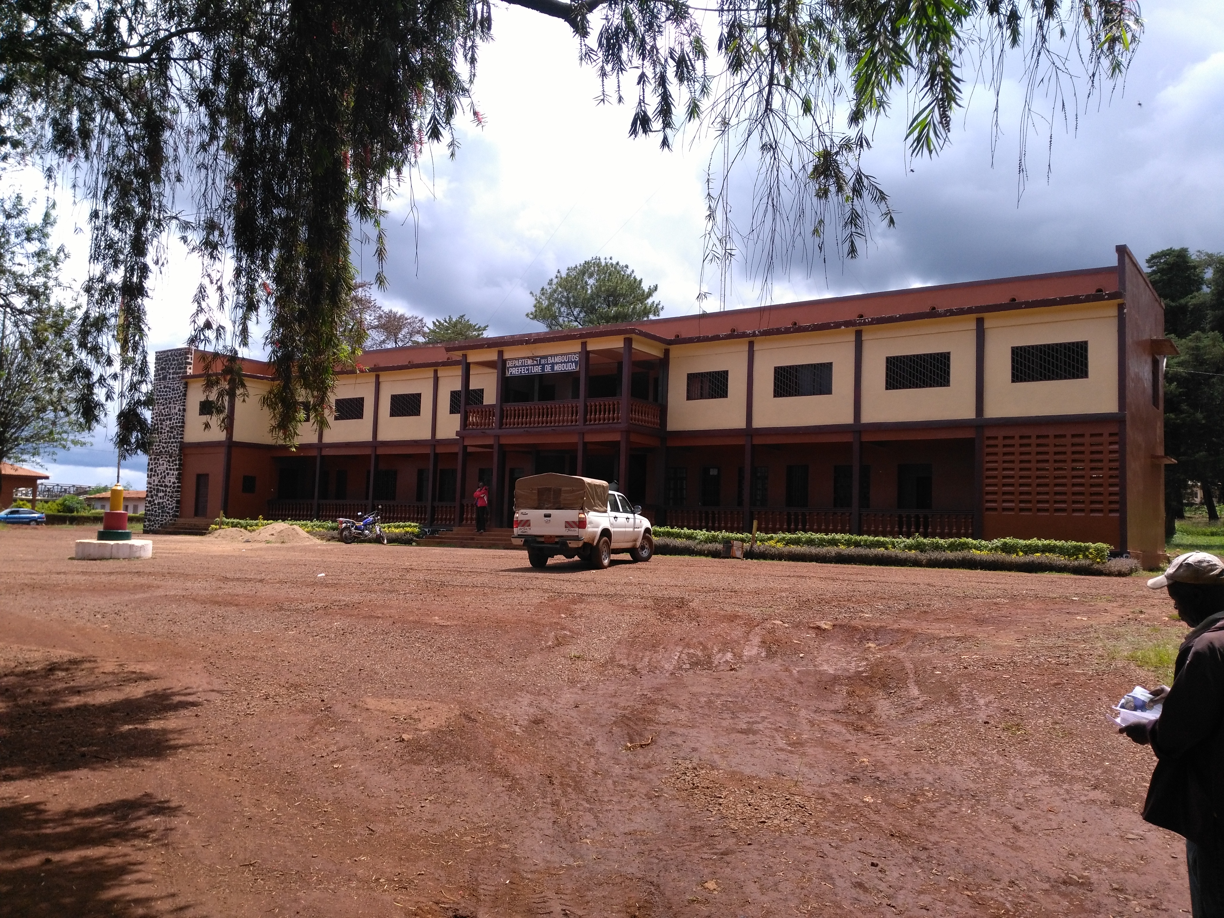 Mbouda